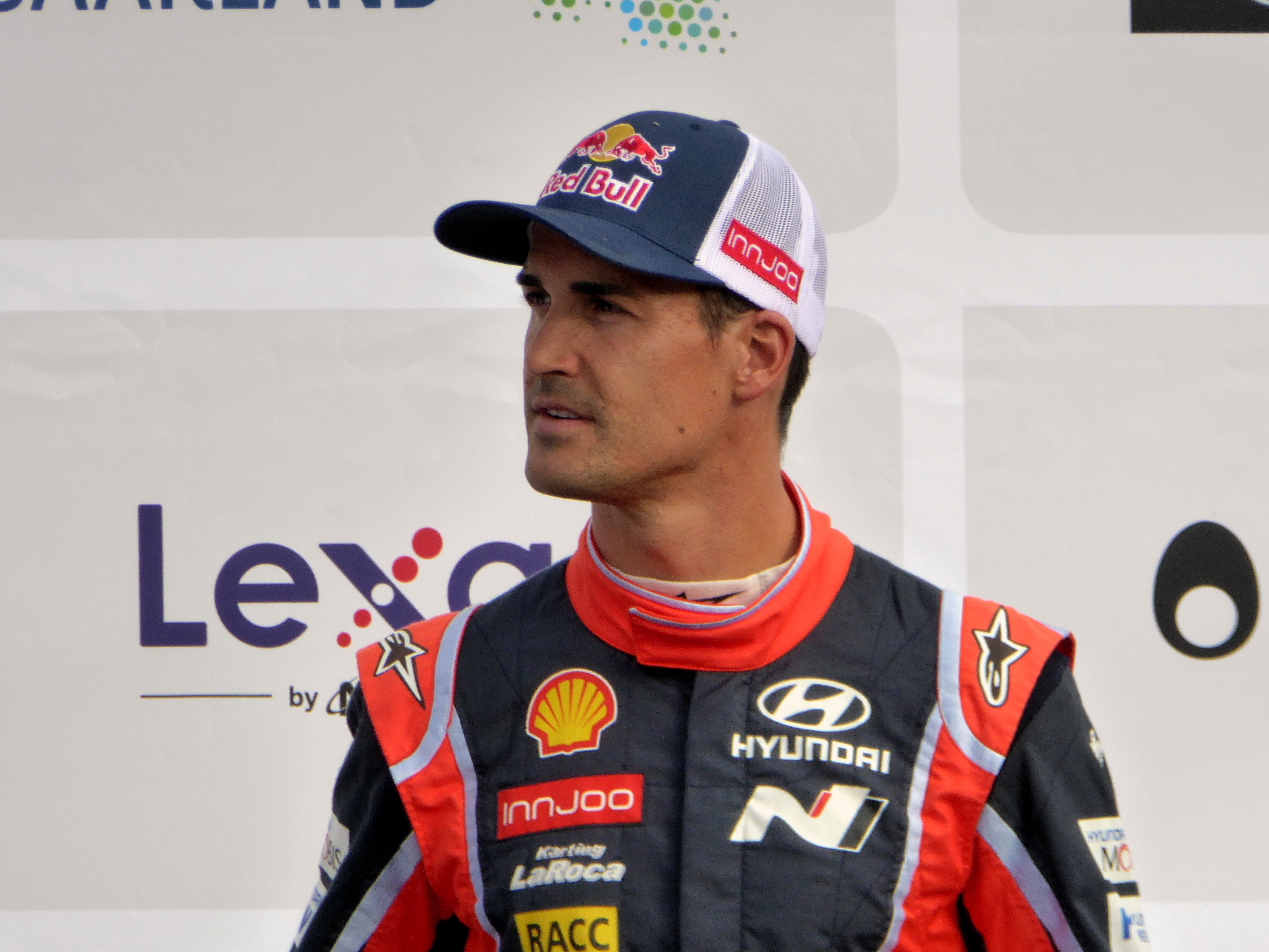 Rallye Deutschland 2017, Eröffnungszeremonie auf dem Tbilisser Platz in Saarbrücken